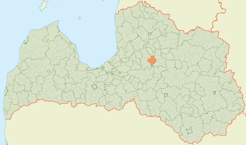 Kategorija:Skujenes pagasts Kategorija:Latvijas pagastu kartes